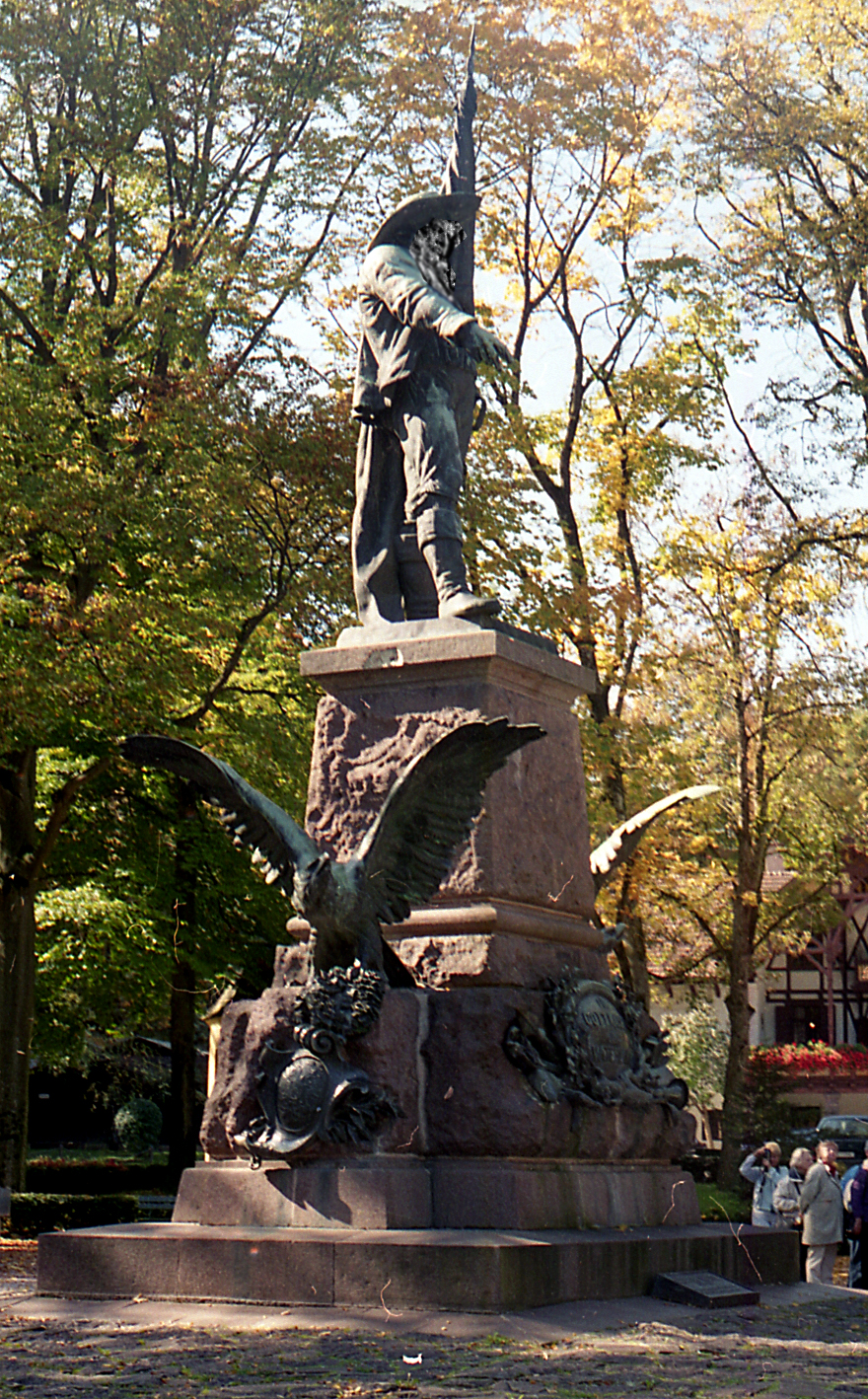 Бергизель.Памятник Андреасу Хоферу